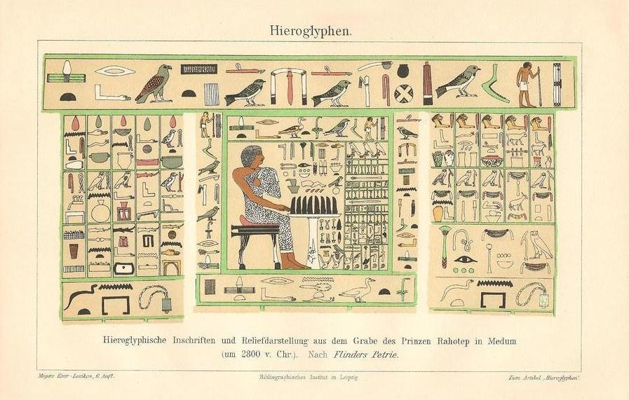 Иероглифы Египет (2800 лет до Р.Х.)